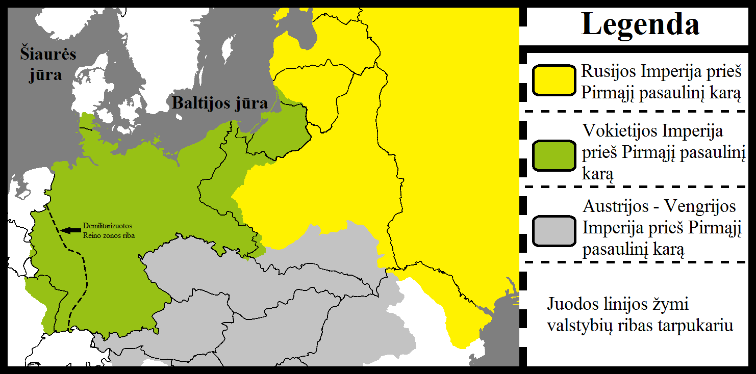 Centrinė Europa prieš Versalio sutartį ir po jos